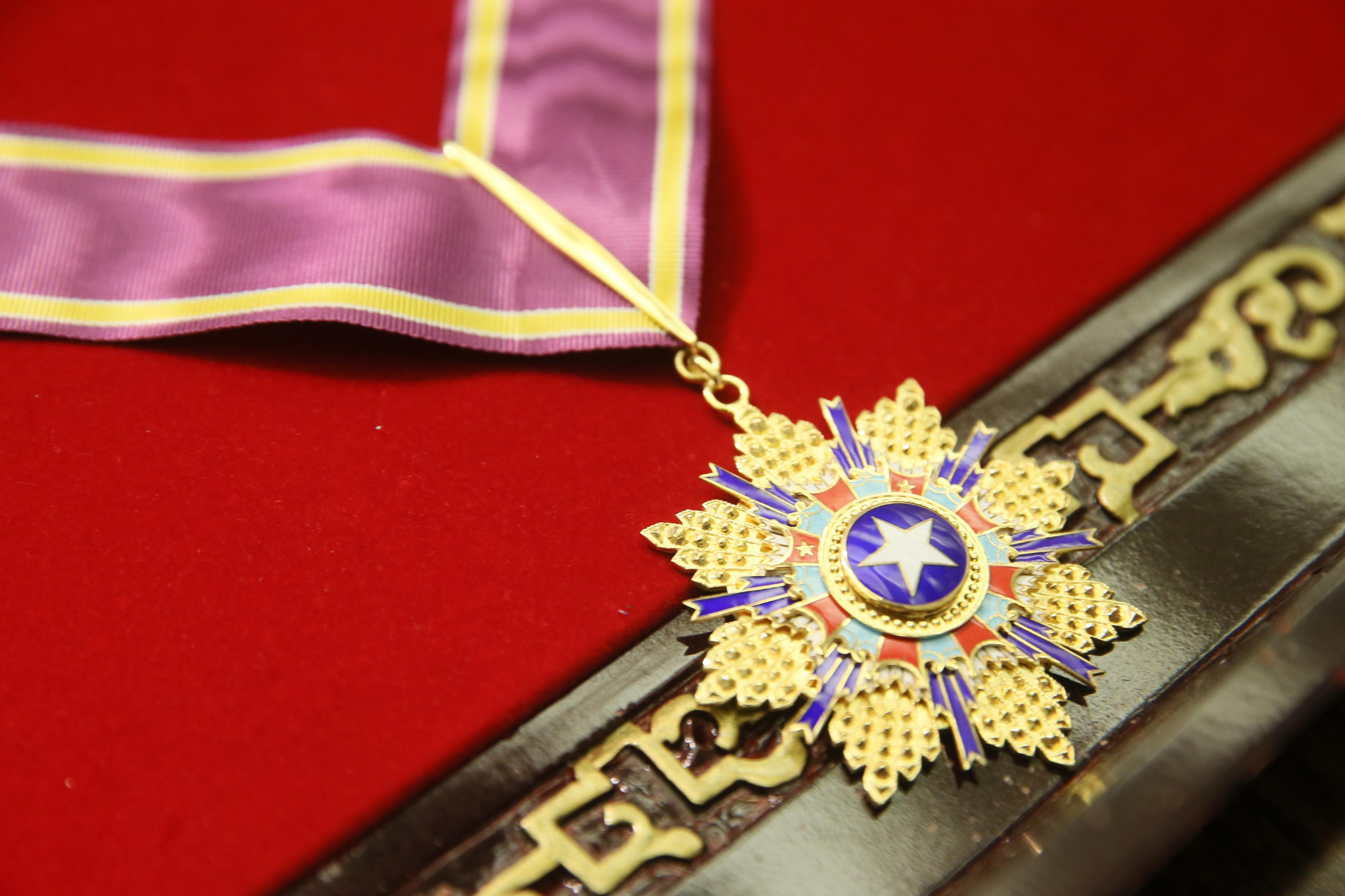 五等景星勳章。